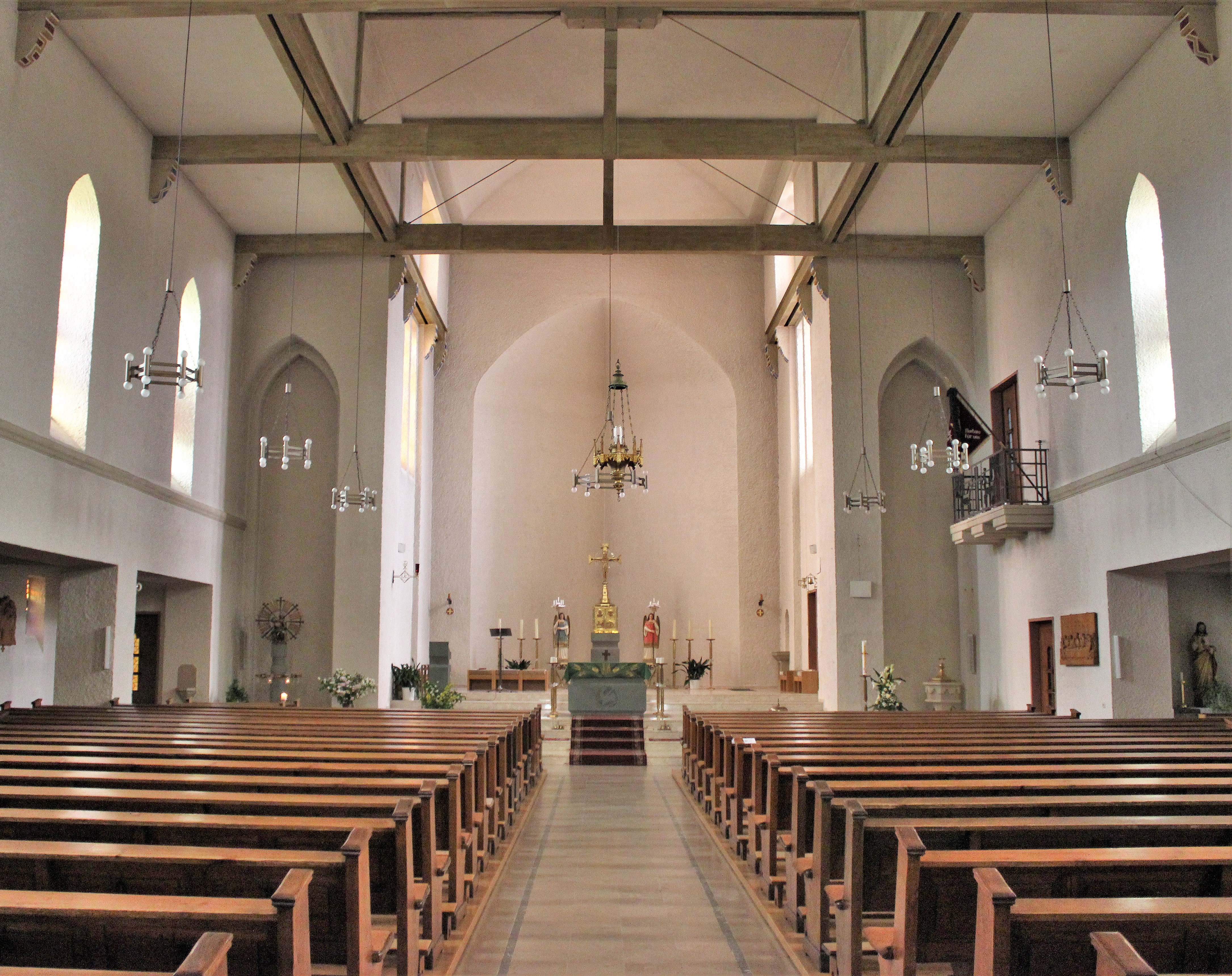 Blick ins Innere der katholischen Pfarrkirche St. Marien in Schmelz, Landkreis Saarlouis, Saarland